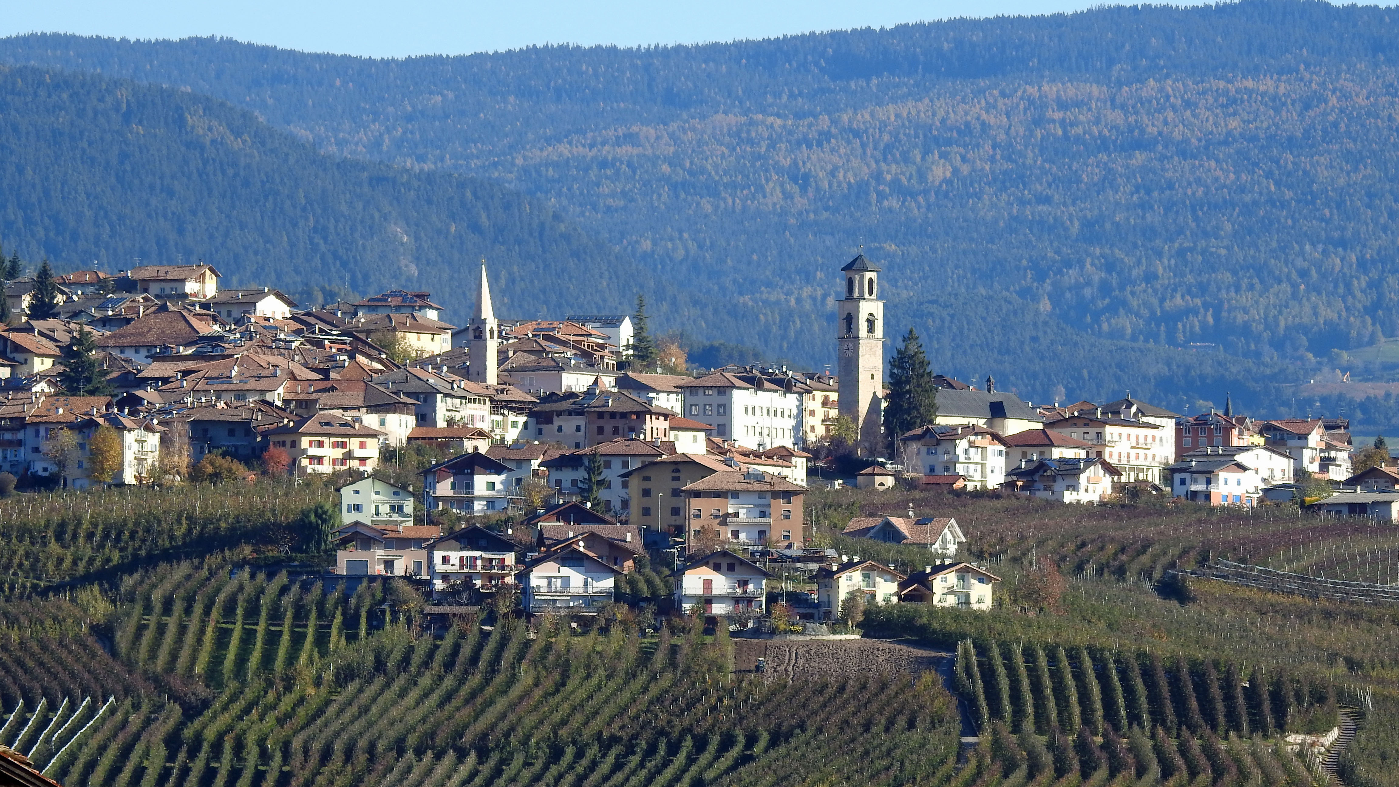 Revo, Trentino, da sud